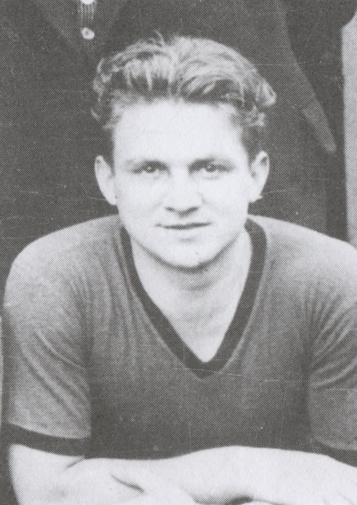 Photographie de Walter Kaiser, date inconnue (années 1930)